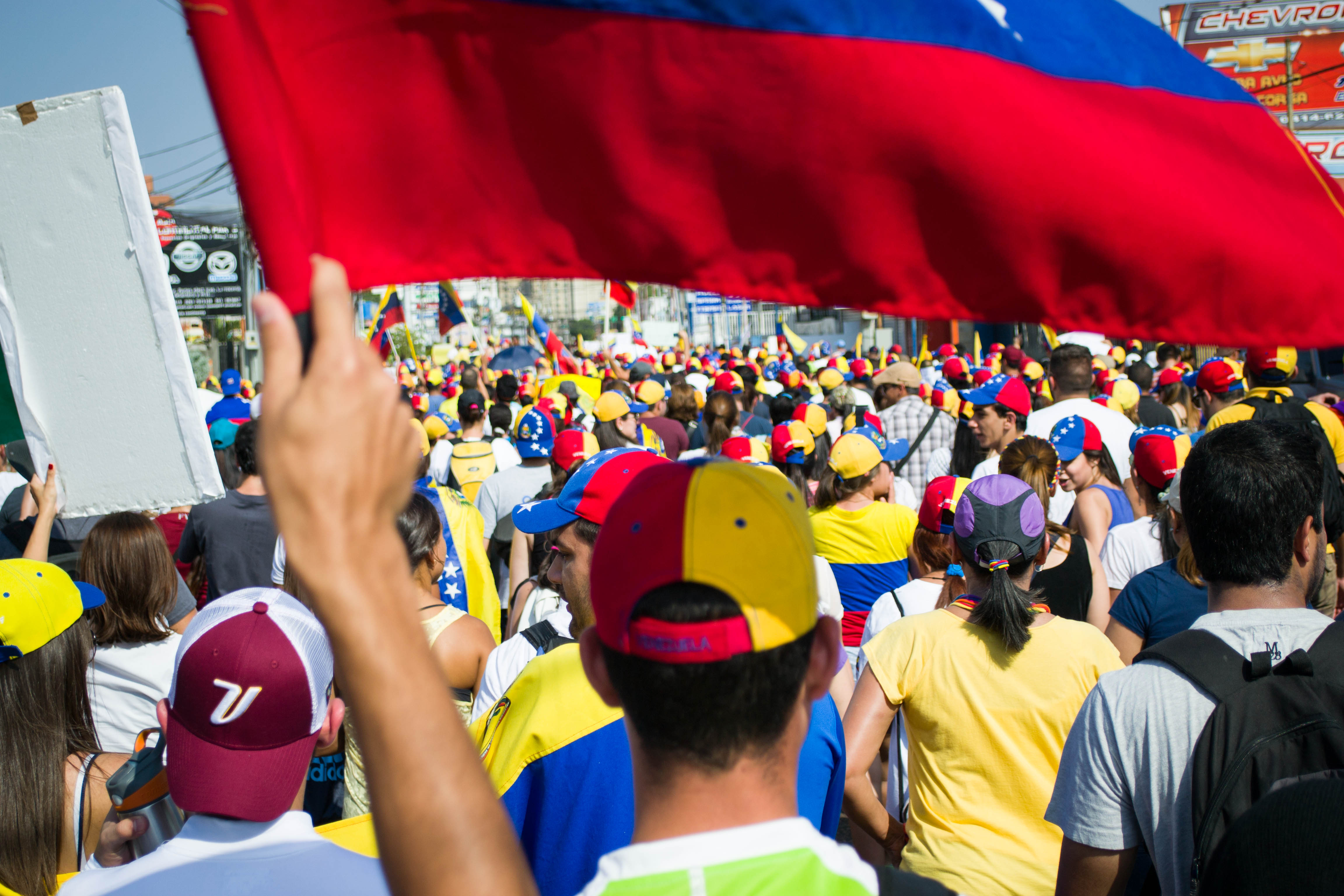 Así marcharon pacíficamente en Maracaibo - Venezuela